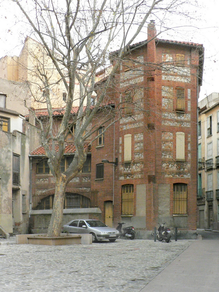 Ancien presbytère de la Cathédrale Saint-Jean Baptiste, rue de l'horloge à Perpignan.